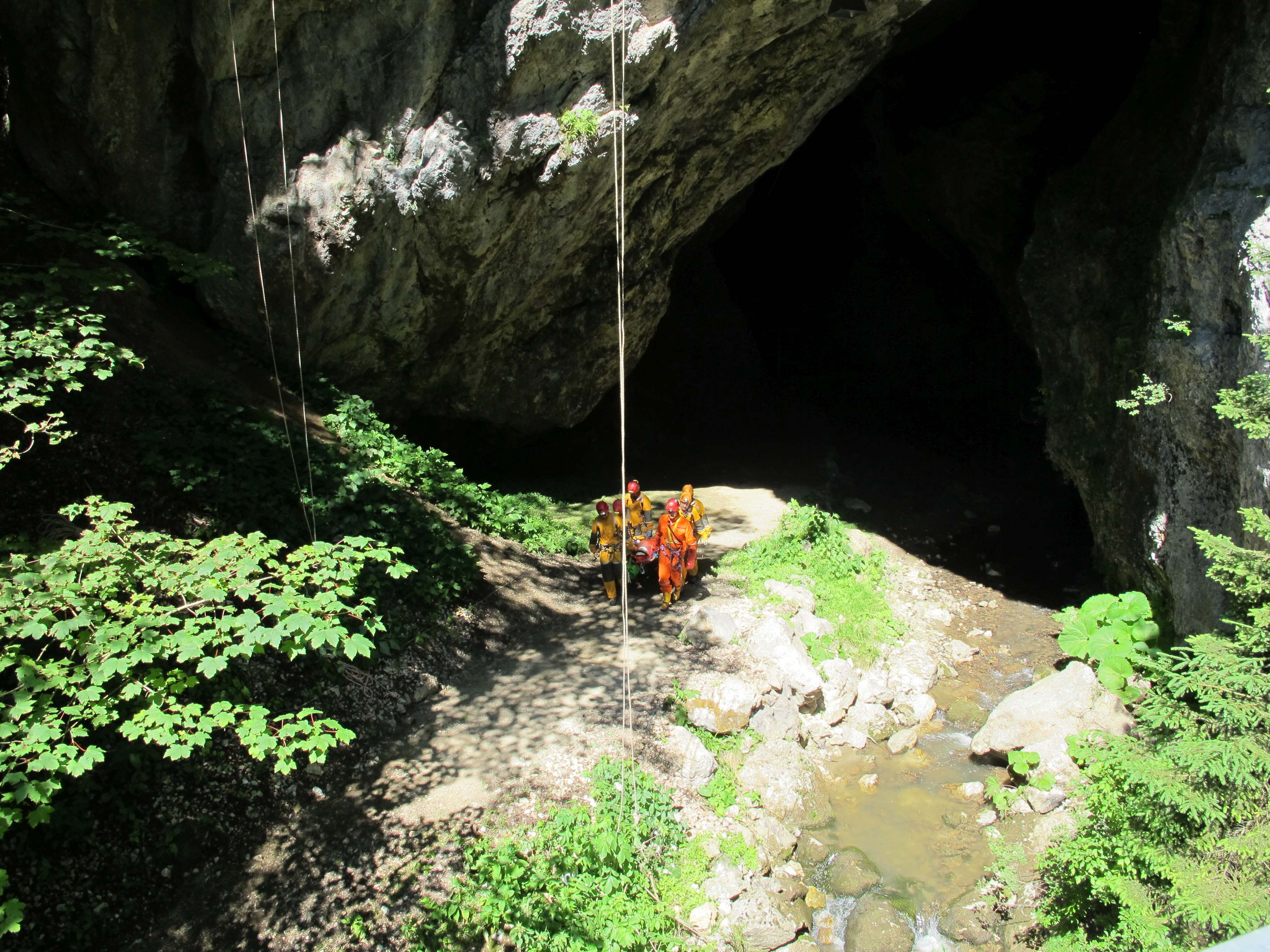 Vaja jamarskih reševalcev v Hudi luknji.